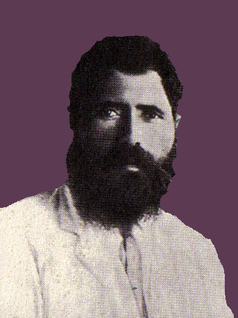 יוסף חיים ברנר.